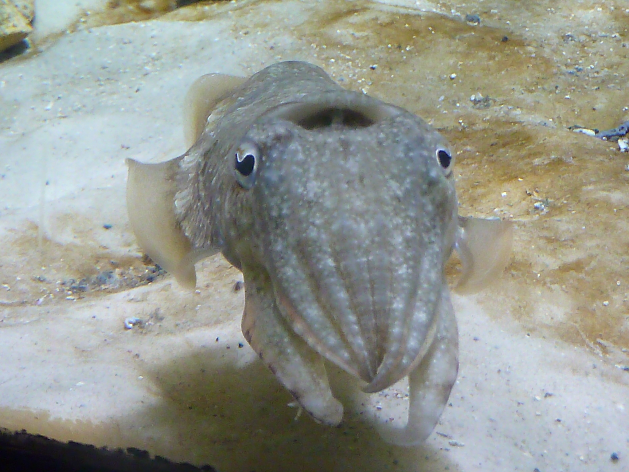 Sepia in Frankfurt